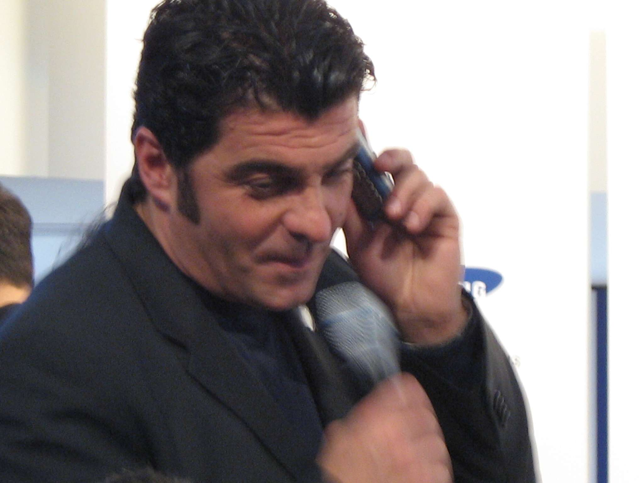 Tomba en una accion de caridad en Turín el 16 de Febrero de 2.006 Alberto Tomba attending a Samsung charity auction sale in Sponsors Village, Turin, February 16 2006. Photo by Dzag.